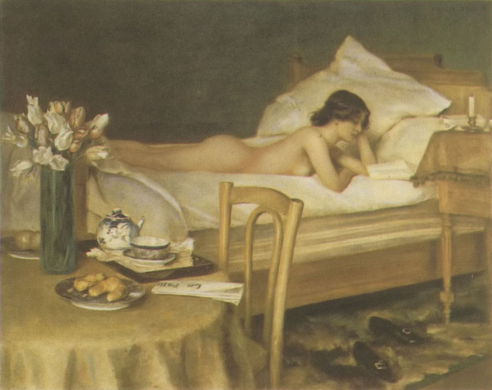 Der Bücherwurm.